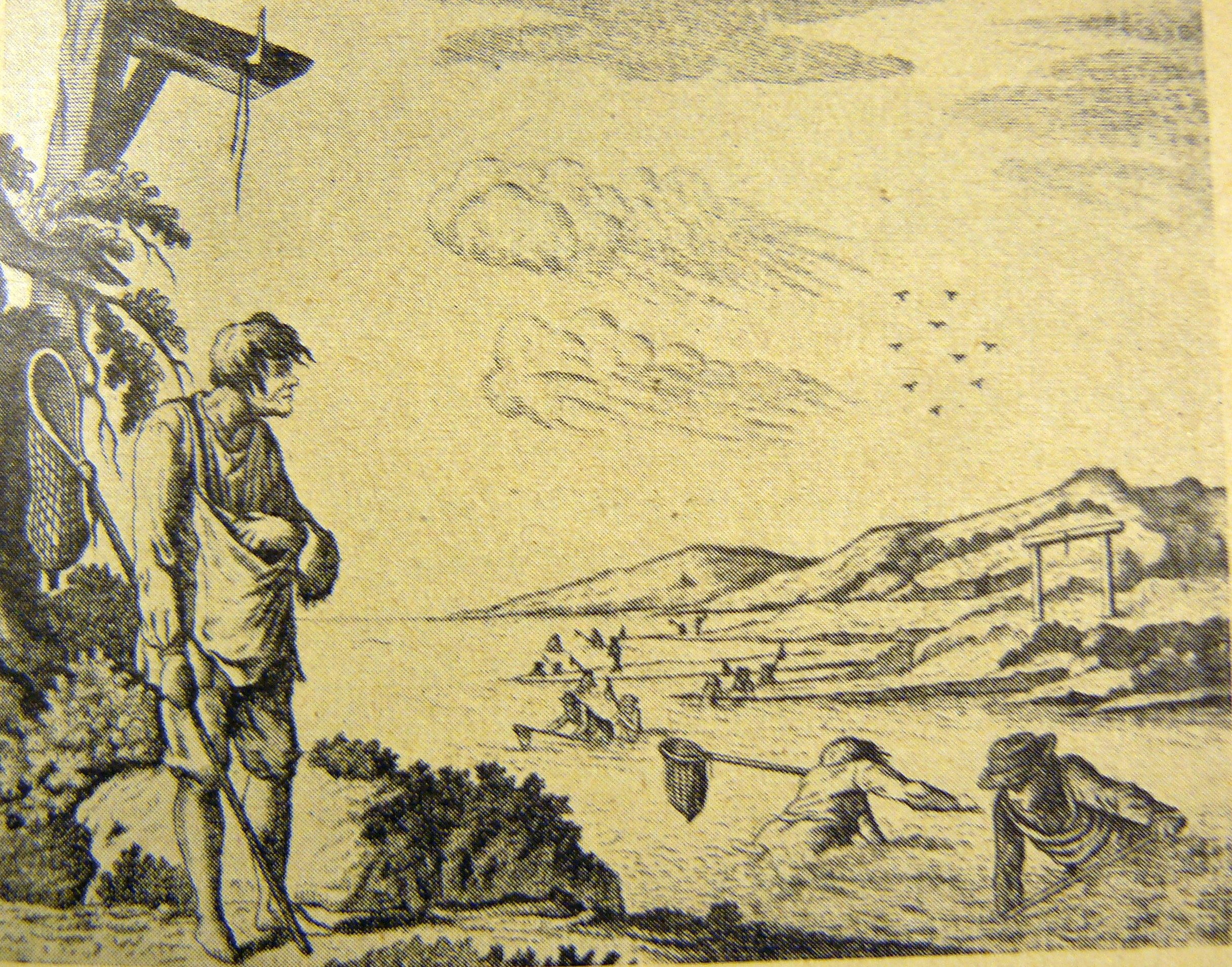 Bernsteinfischer und Galgen an der Bernsteinküste. Nach einem Kupferstich von J. Wagner, erschienen 1774 Wiener Flugblatt.